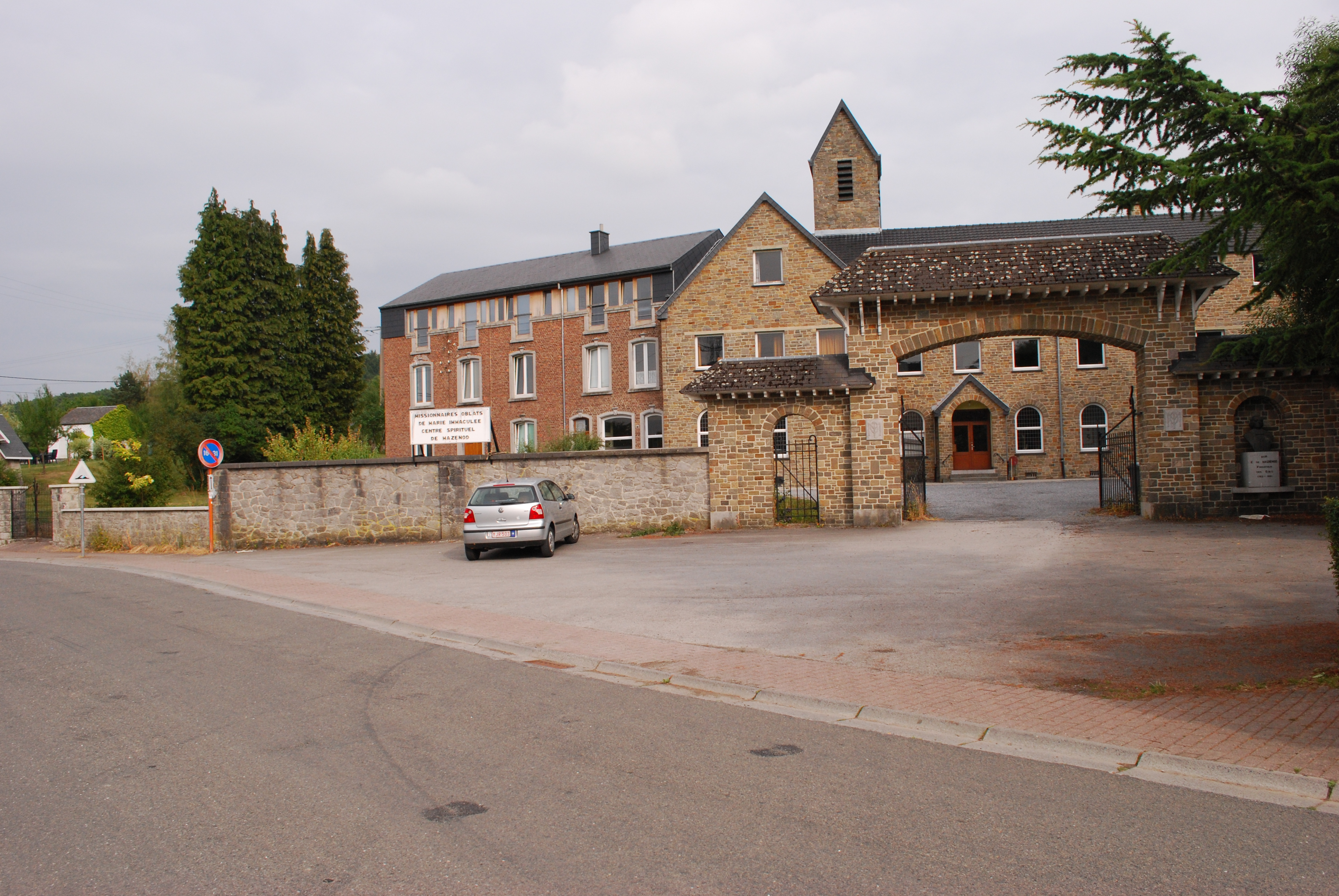 Maison des missionnaires Oblats en Chainrue à Barvaux.